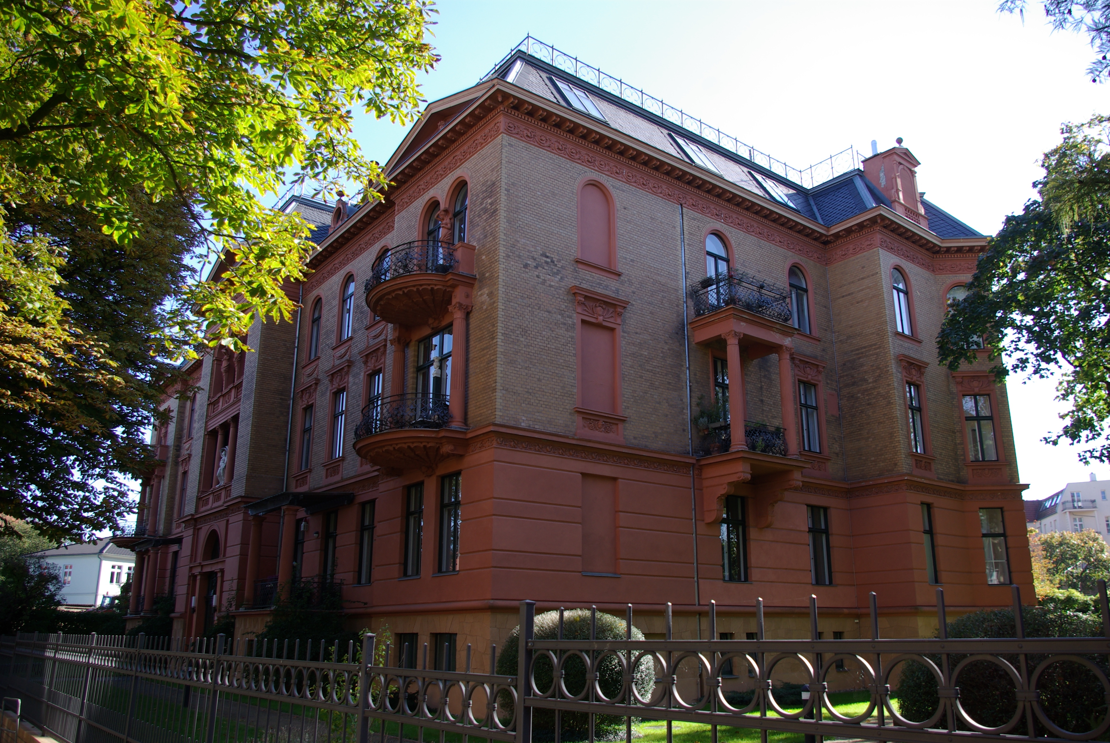 Potsdam in Brandenburg. Das Haus in der Mangerstraße 19 in der Berliner Vorstadt steht unter Denkmalschutz.